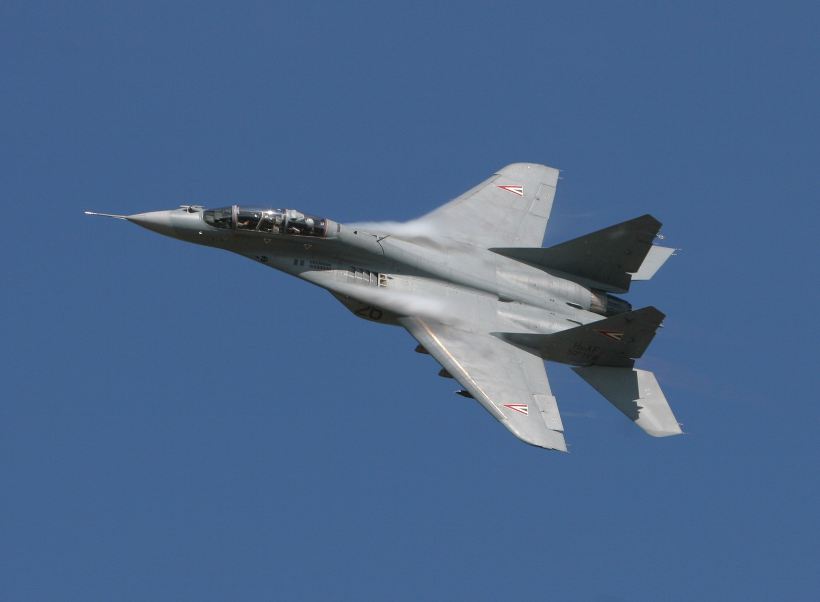 HuAF MIG-29UB '26' at Koksijde Airshow 2005